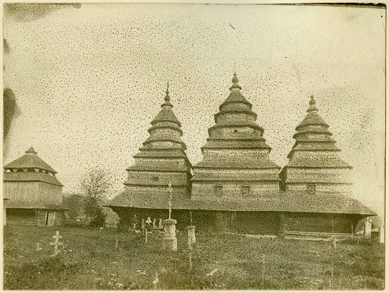 Деревянный храм Сошествия Святого Духа (1814) в с. Нижнее Высоцкое Турковский район (Львовская область, Украина)